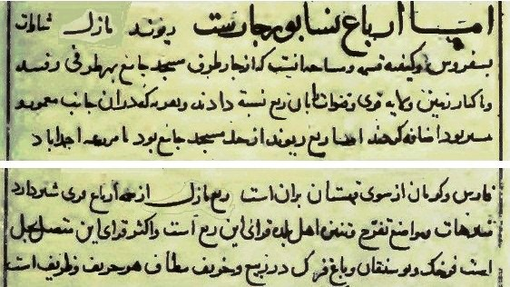 بریده‌ای از نسخه خطی کتاب تاریخ نیشابور الحاکم که مطالبی درباره ارباع نیشابور و ربع مازل را نشان می دهد